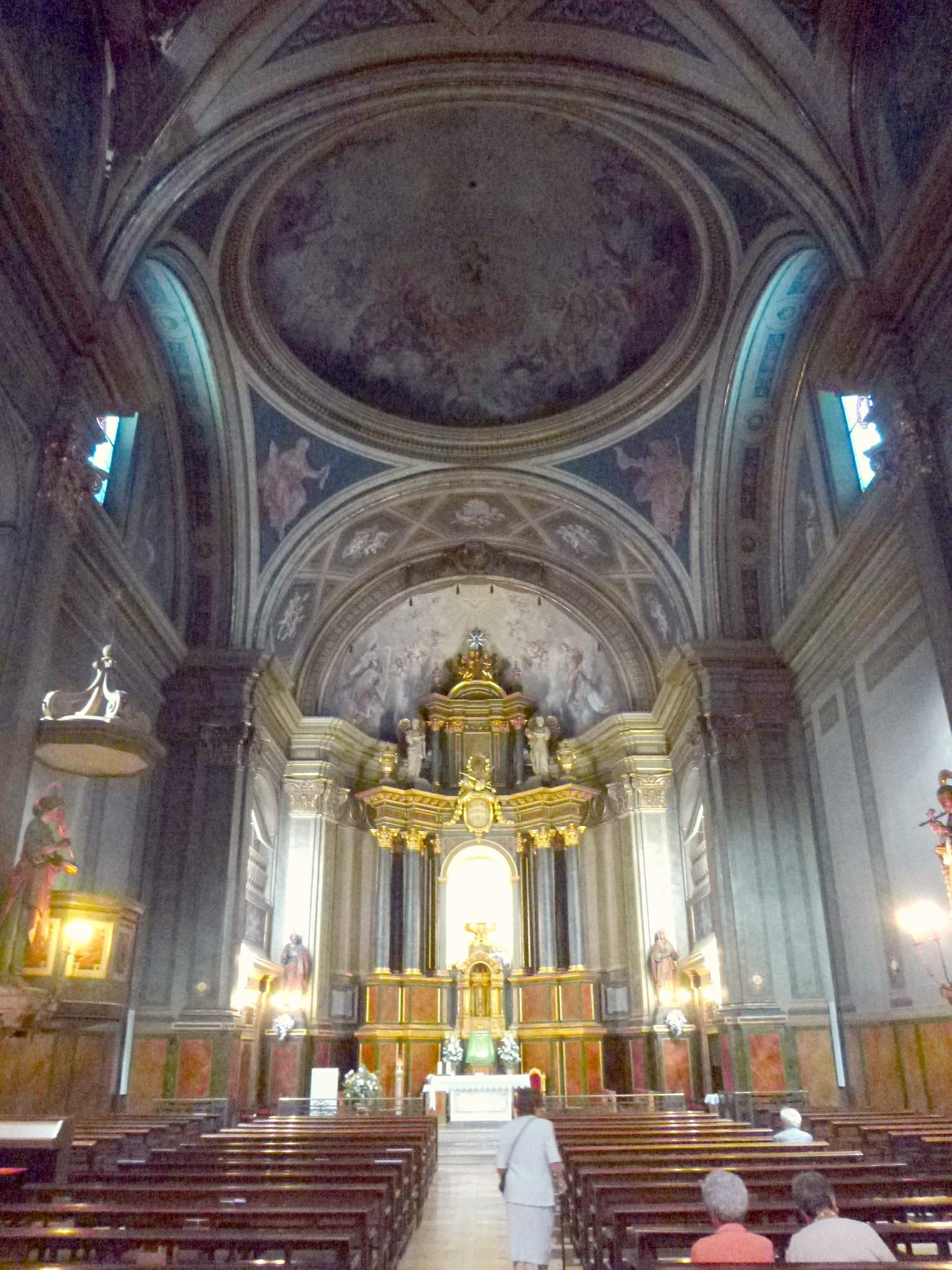 Santuari de la Mare de Déu del Tura (Olot)